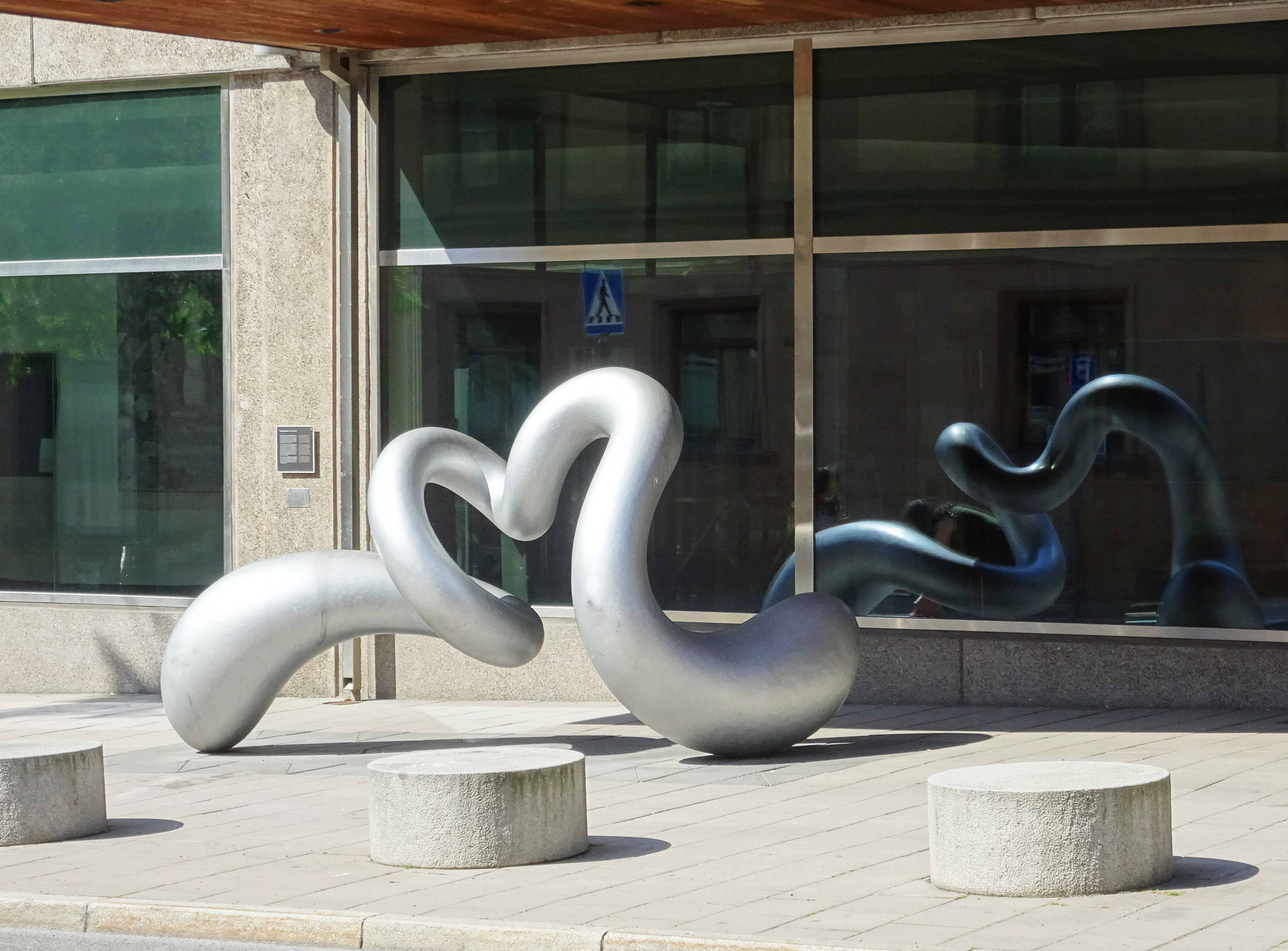 Eva Hilds aluminiumskulptur "Binär" utanför Departementshuset